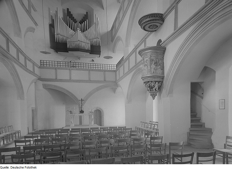 Original image description from the Deutsche Fotothek Musik